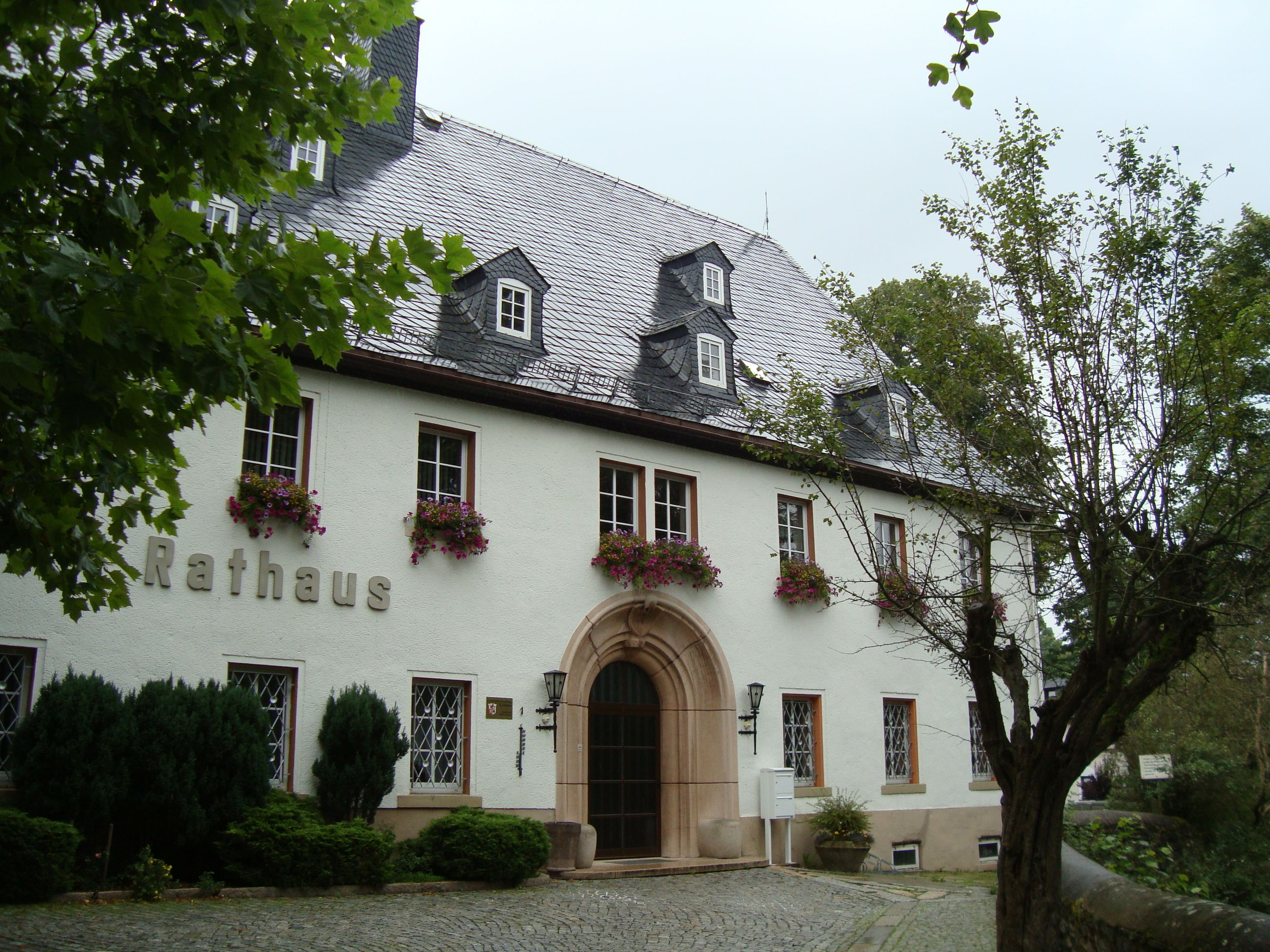 Rathaus (ehemaliges Rittergut) in Gelenau